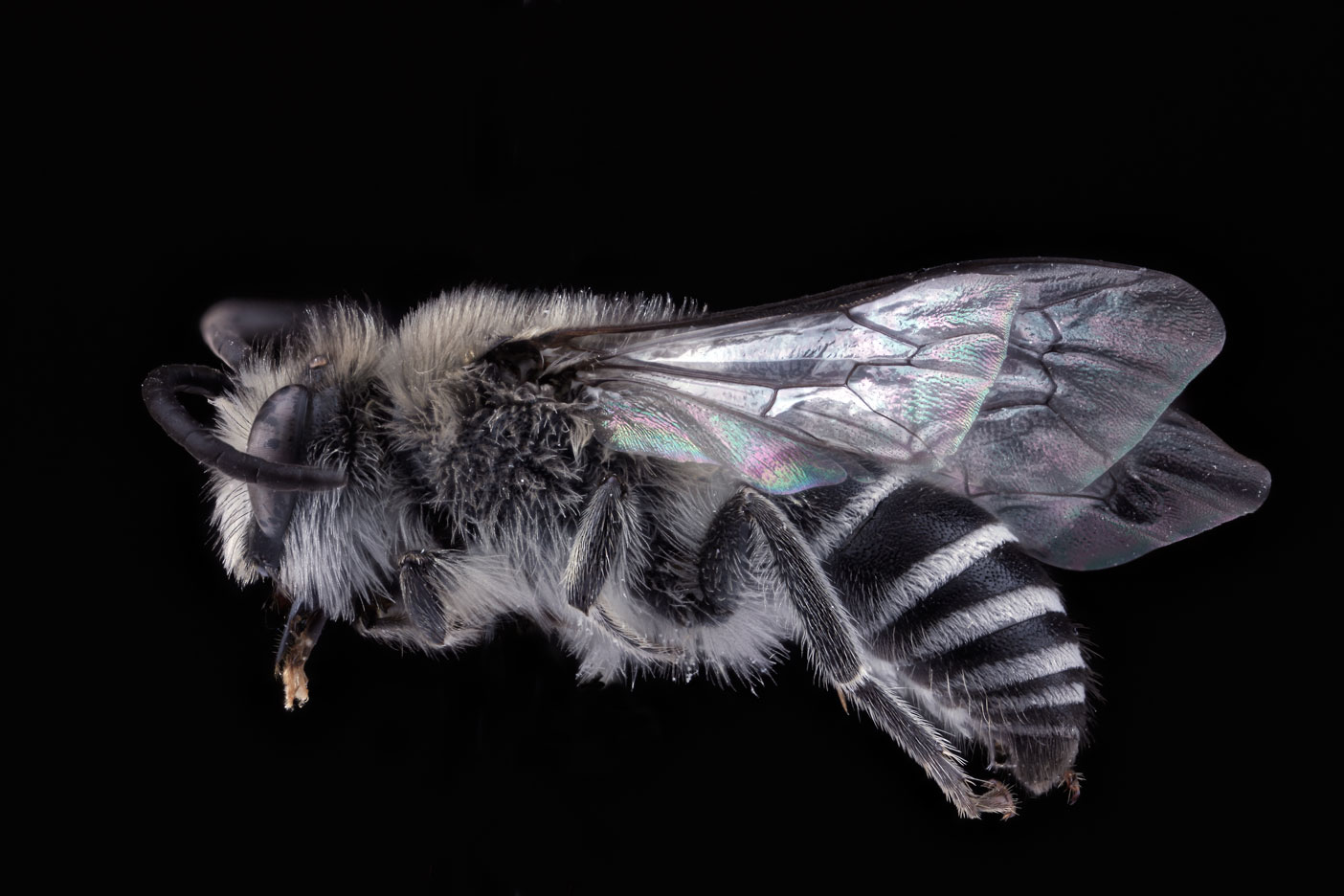 Colletes compactus, female